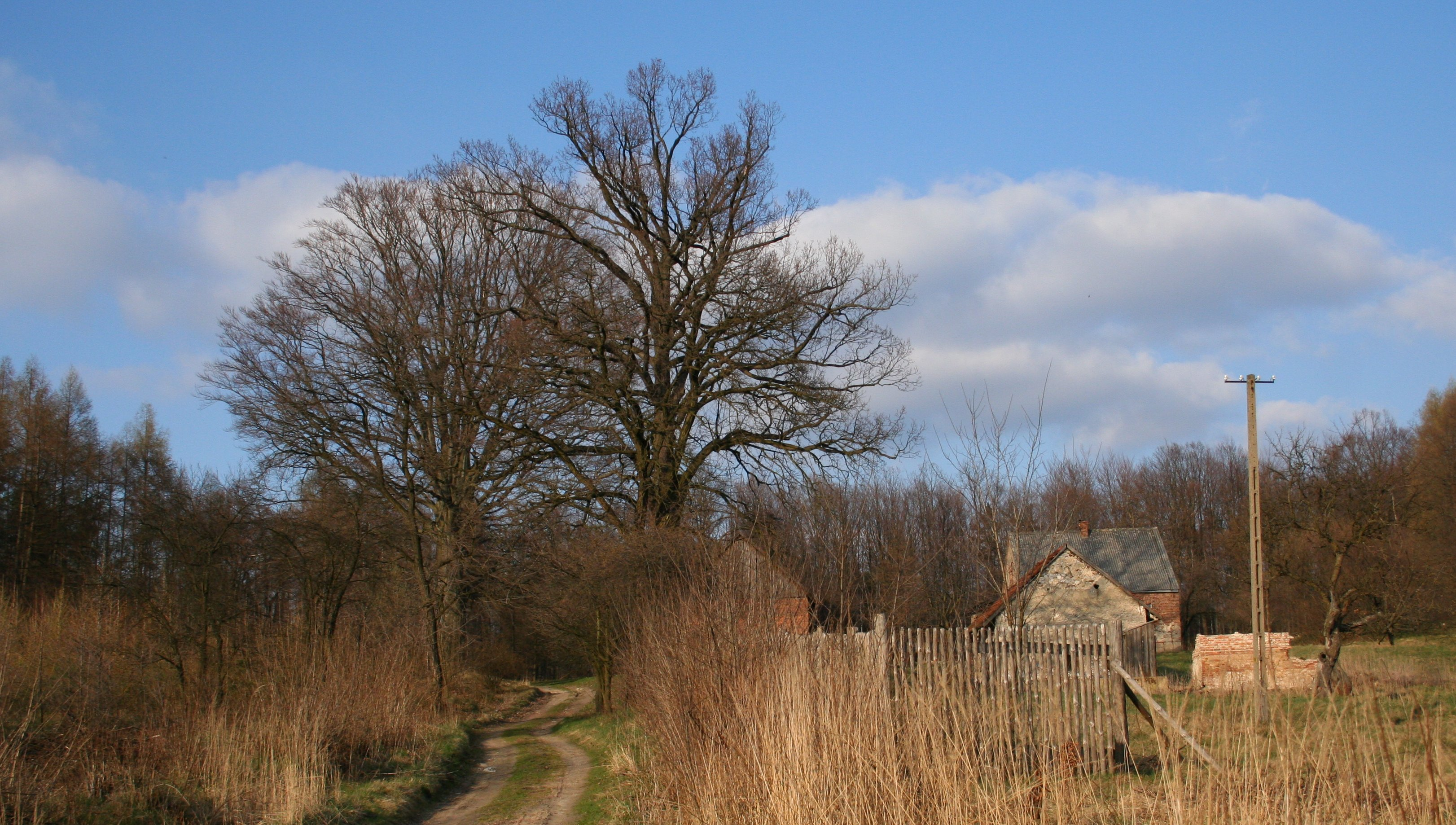 Przysiółek Szklana Huta, gmina Boronów, powiat lubliniecki, województwo śląskie